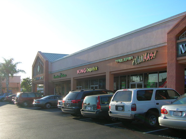 Strip mall in Santa Clara, California